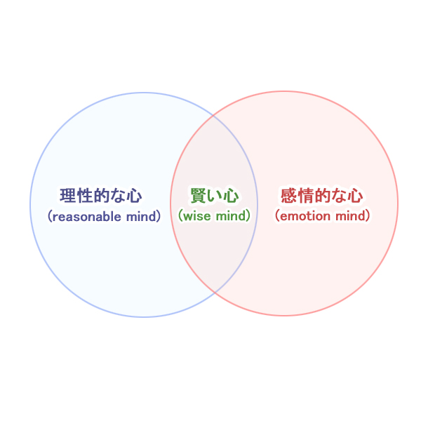 マインドフルネスの資料：心の状態